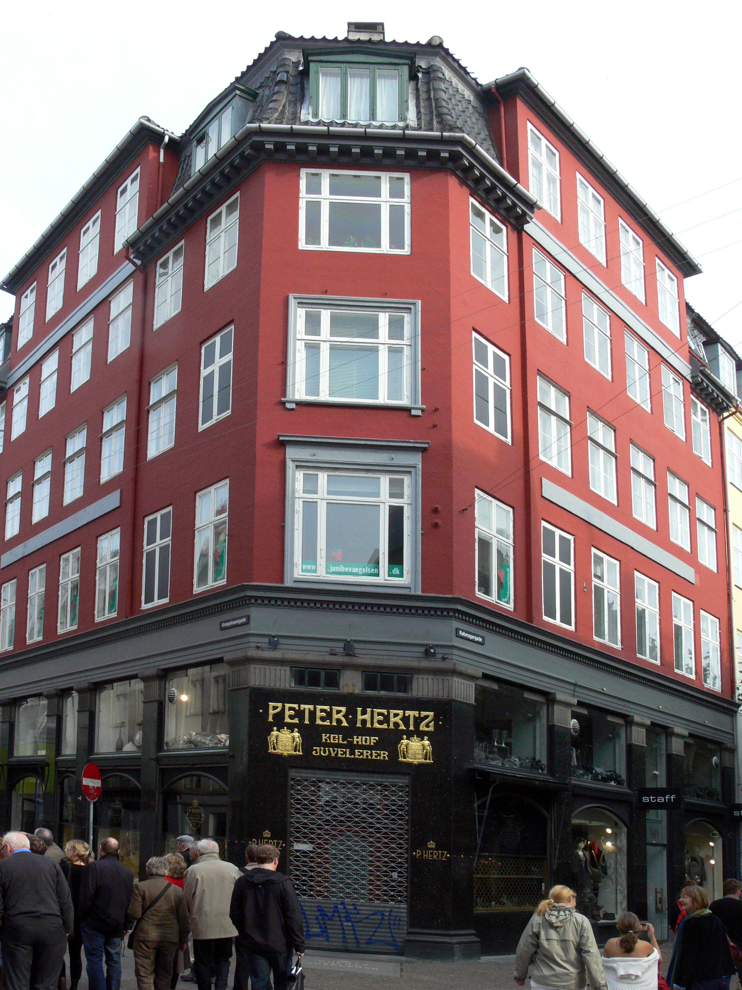 Hier wohnte der Archäologe Carl Christian Rafn. War der 1. Vorsitzende der Arnamagnæanischen Instituts.